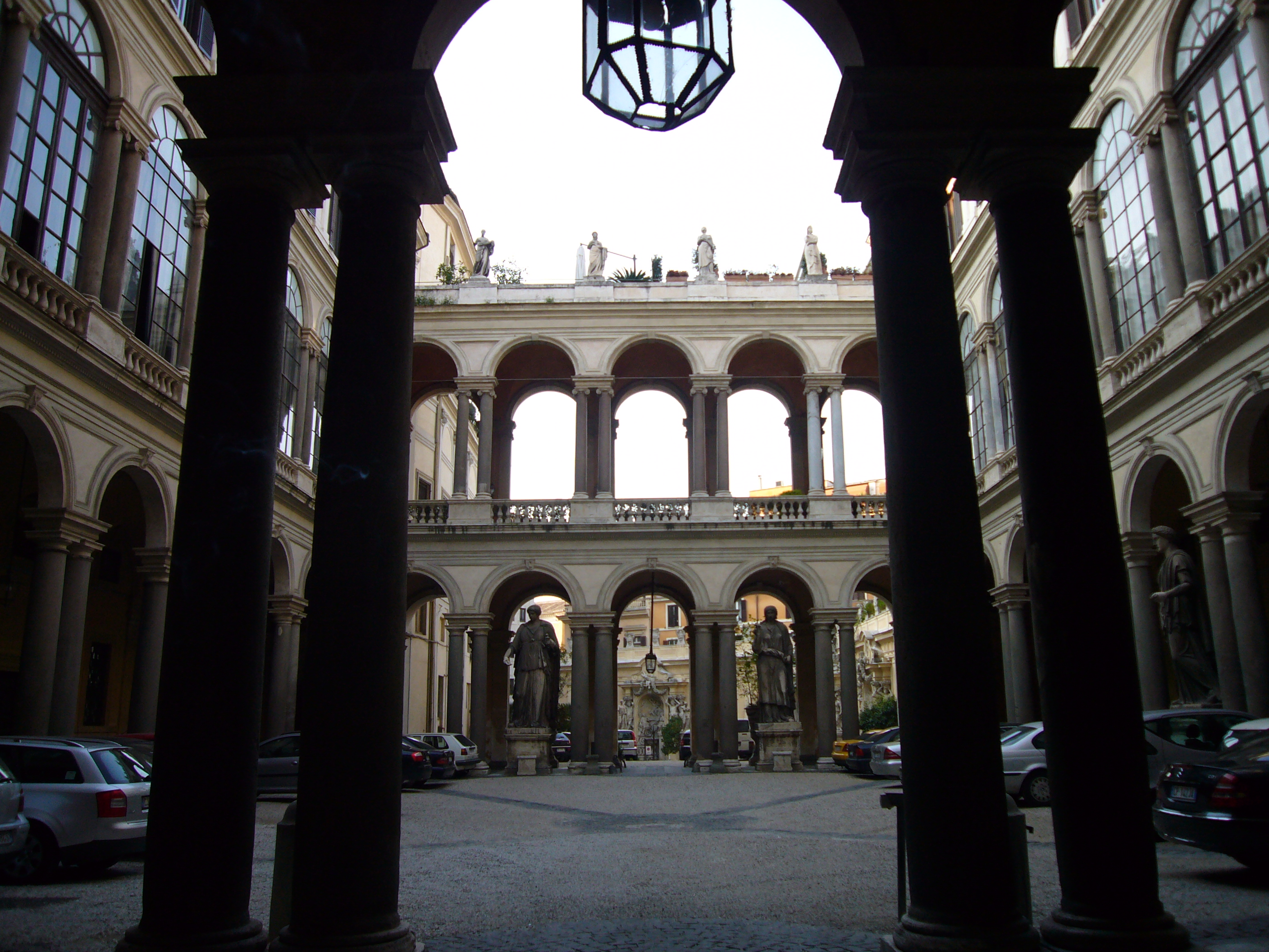 Roma, palazzo Borghese: cortile dall'ingresso del largo della Fontanella di Borghese